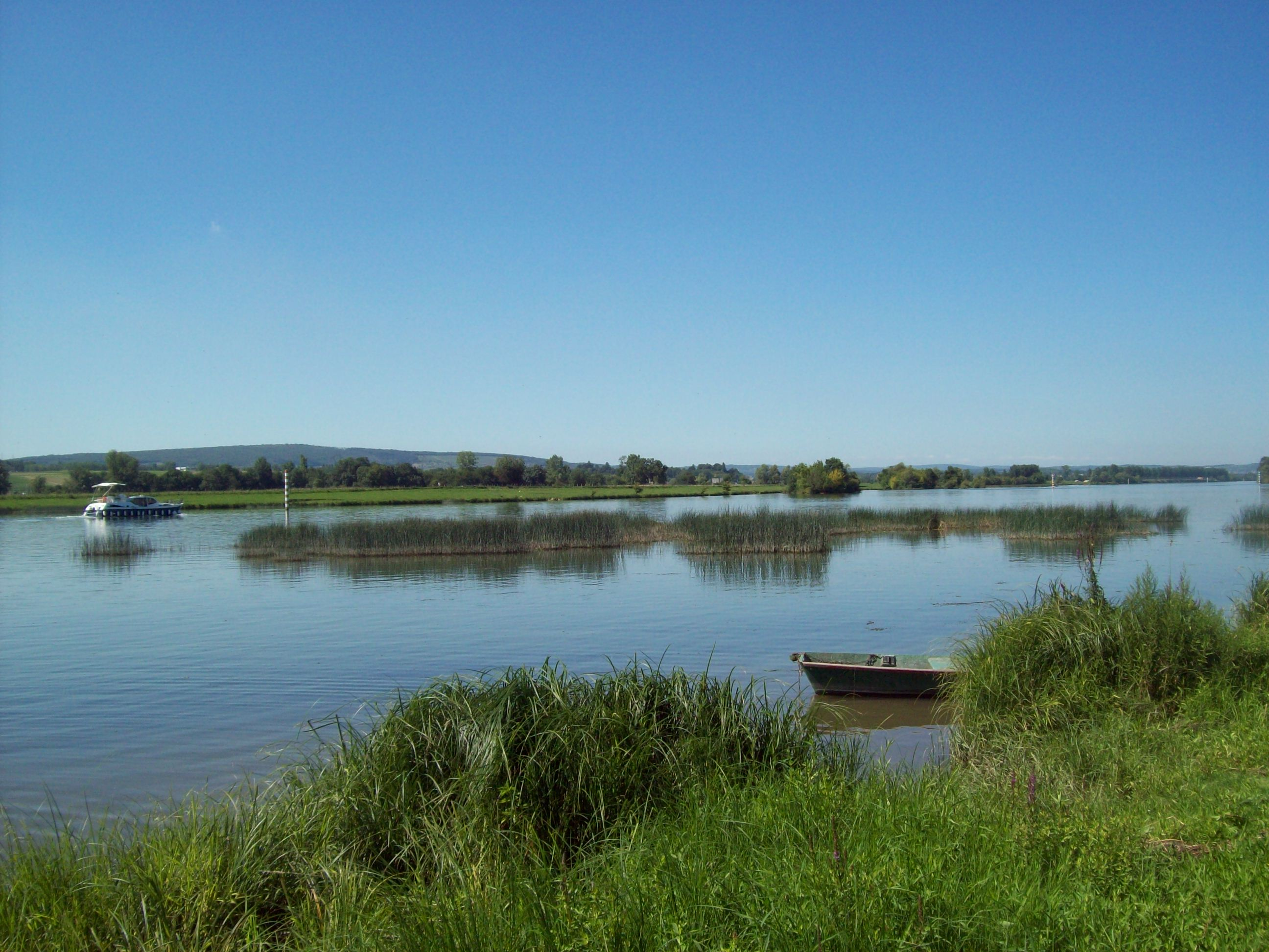 Bord de Saône